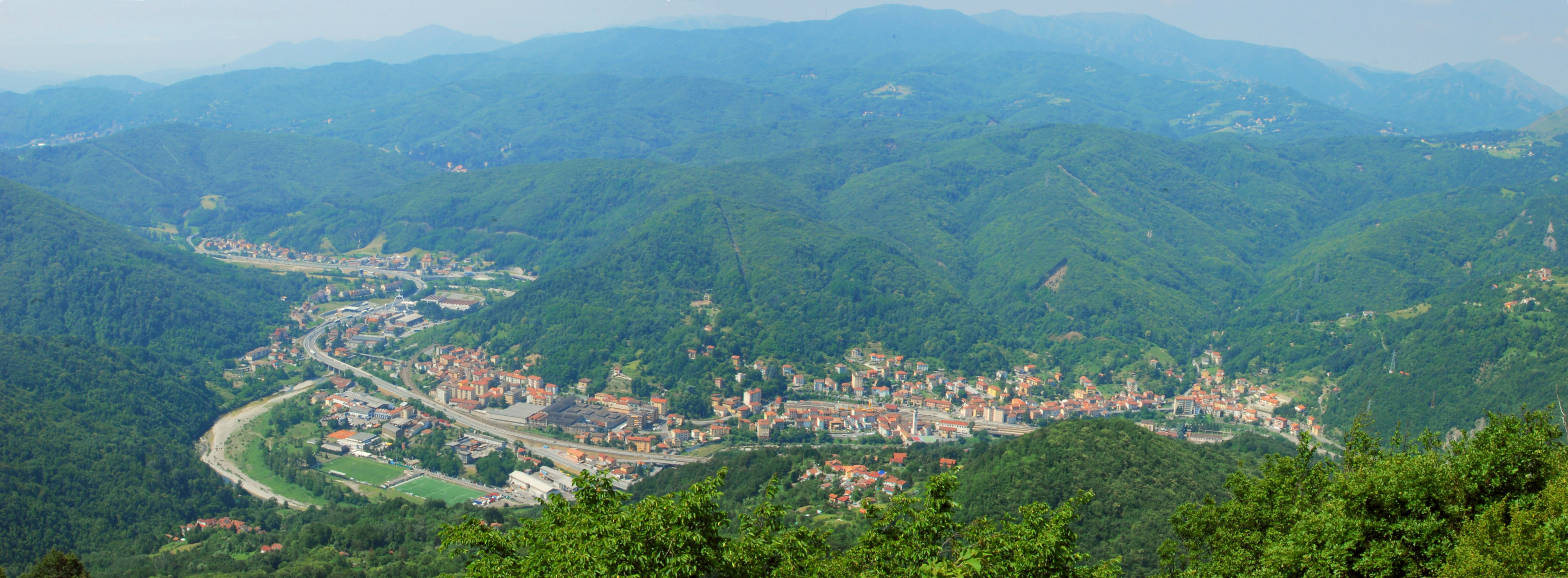 vista panoramica di Ronco Scrivia da Monte Reale